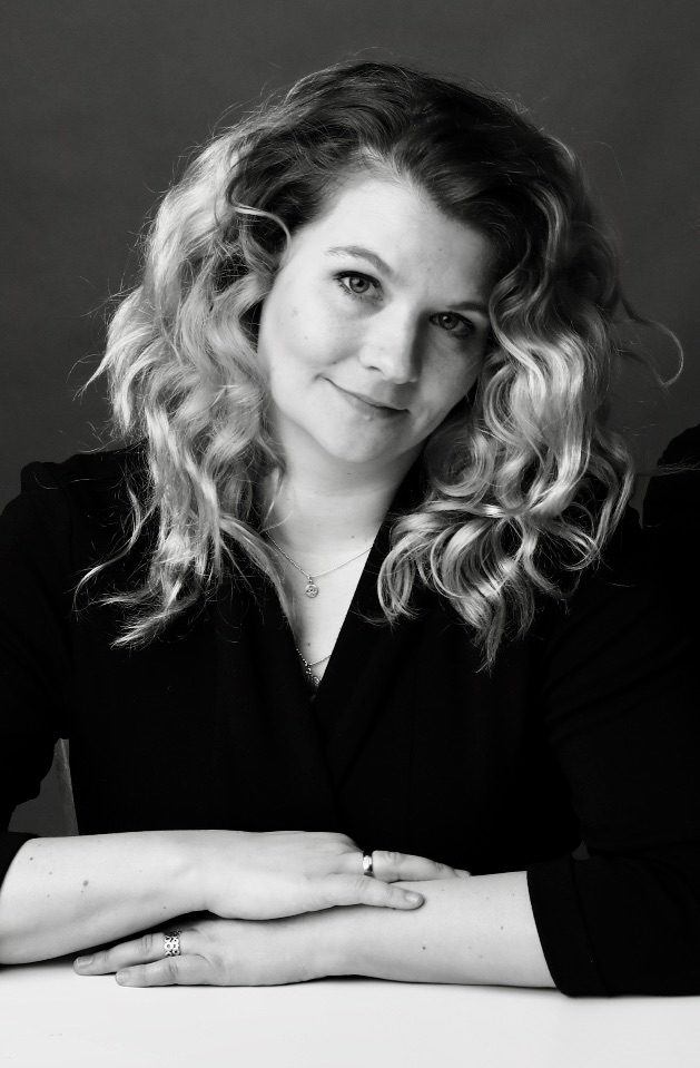 Eva Petzenhauser